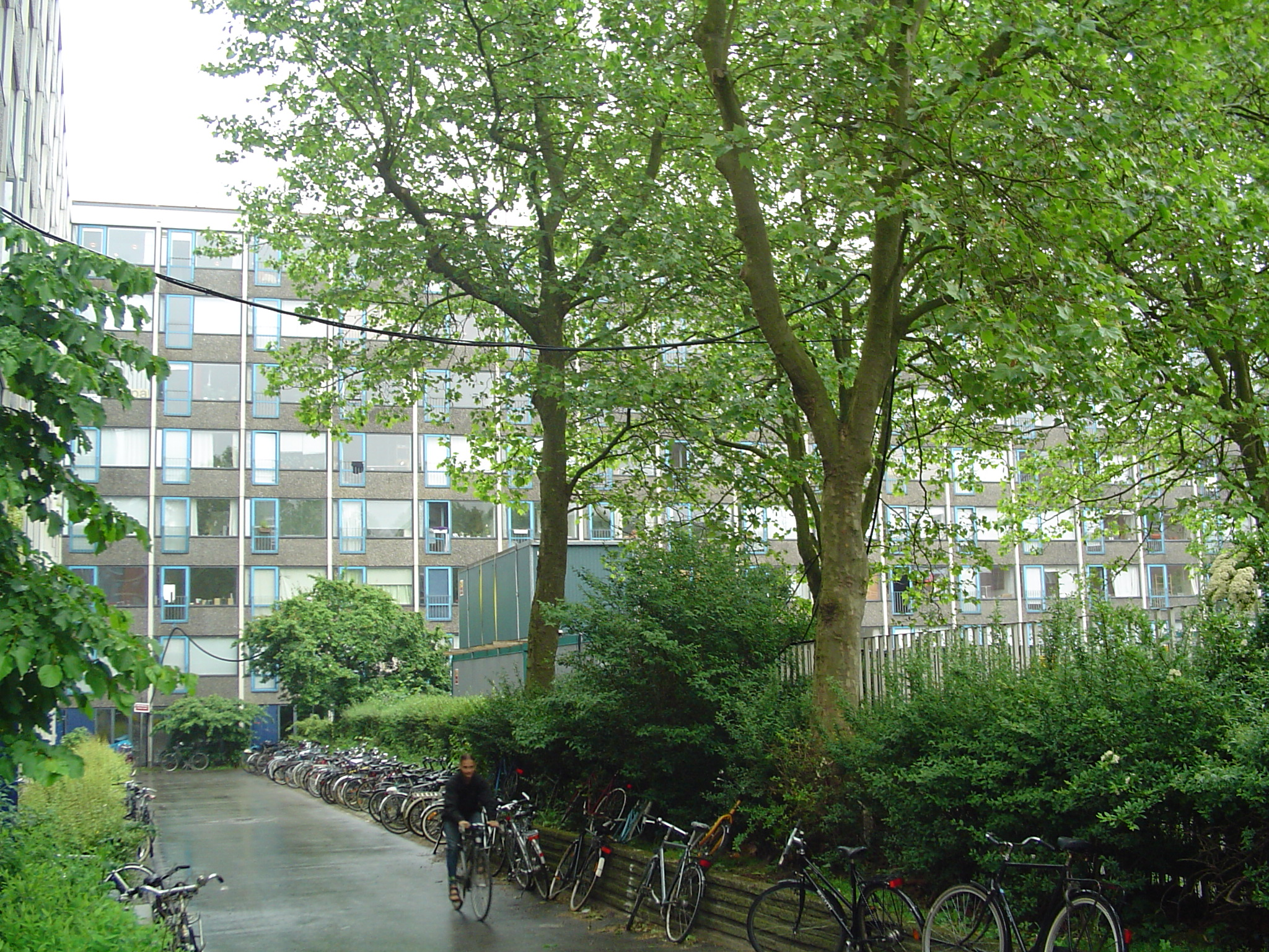 Kollegiegården